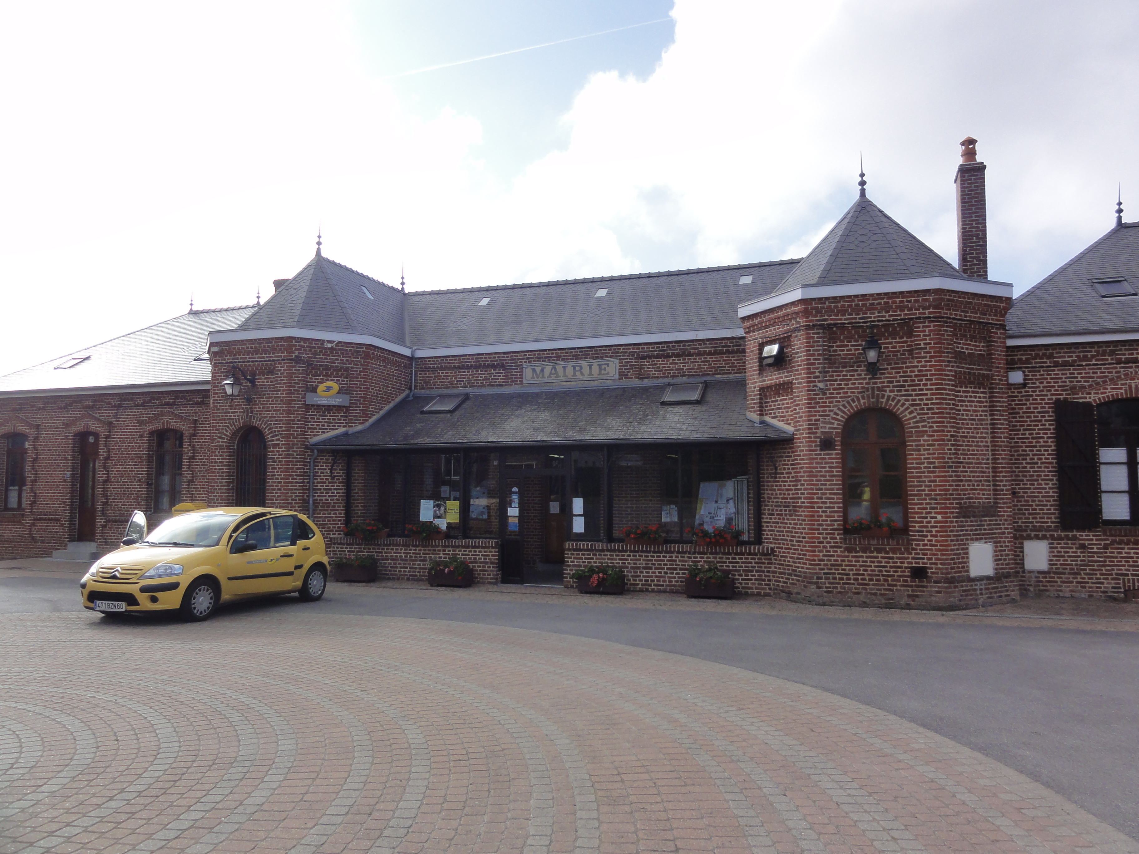 Clairfontaine (Aisne) mairie et ptt